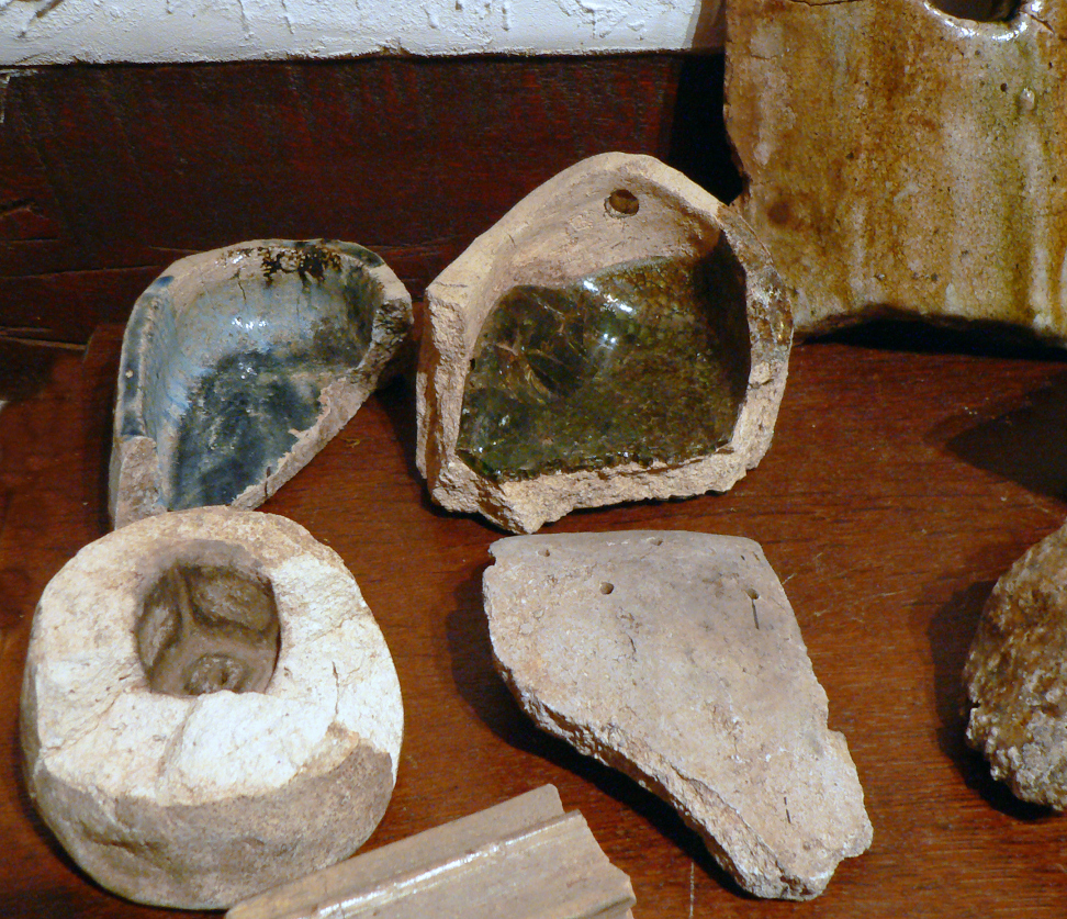 Ausgegrabende technische Keramik, oben zwei Fragmente kleiner Häfen (Glasschmelzgefäße) für blaues und grünes Glas, daneben rechts ein Ofenverschluss als Arbeitsöffnung am Hauptofen, unten links ein Model für vierkantige Apothekerfläschchen, ein Einstechmodel für Mehrkantgläser und eine Randscherbe eines Kühlgefäßes